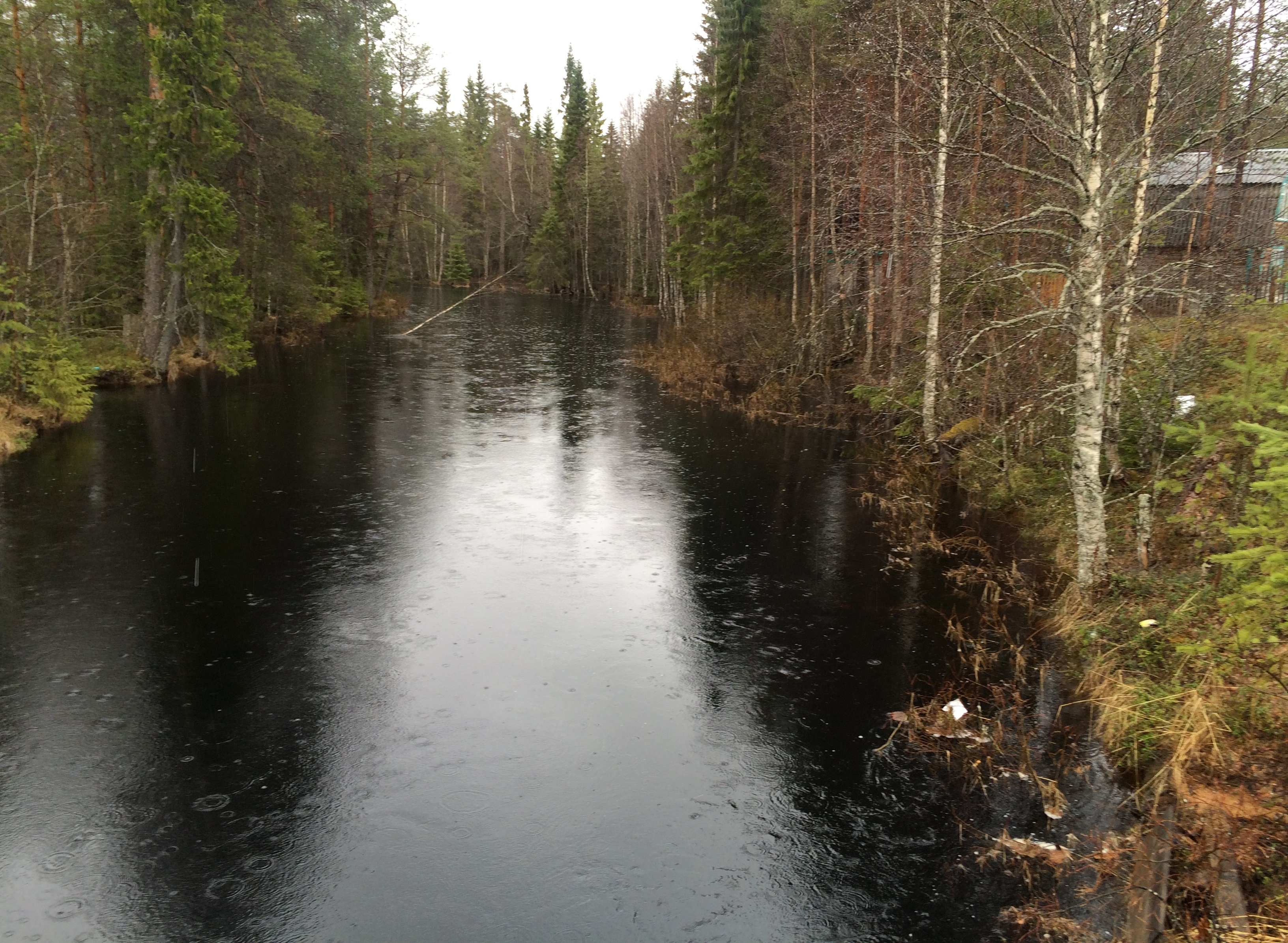 Кожала